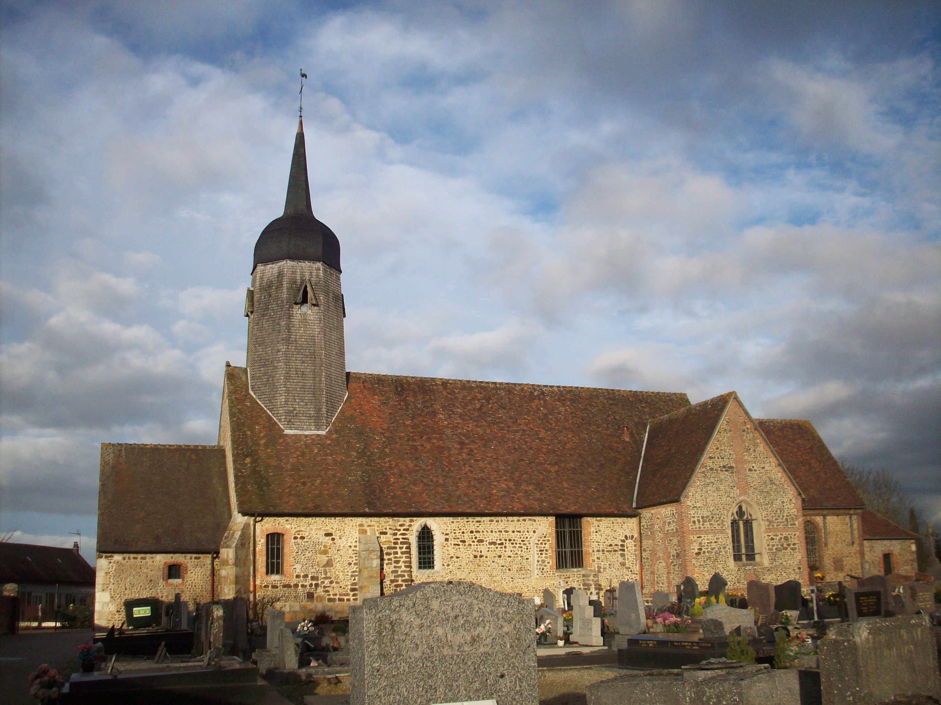 Église Saint-Pierre